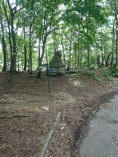 五波峠頂上の石碑。手前には登山道の案内看板がある。